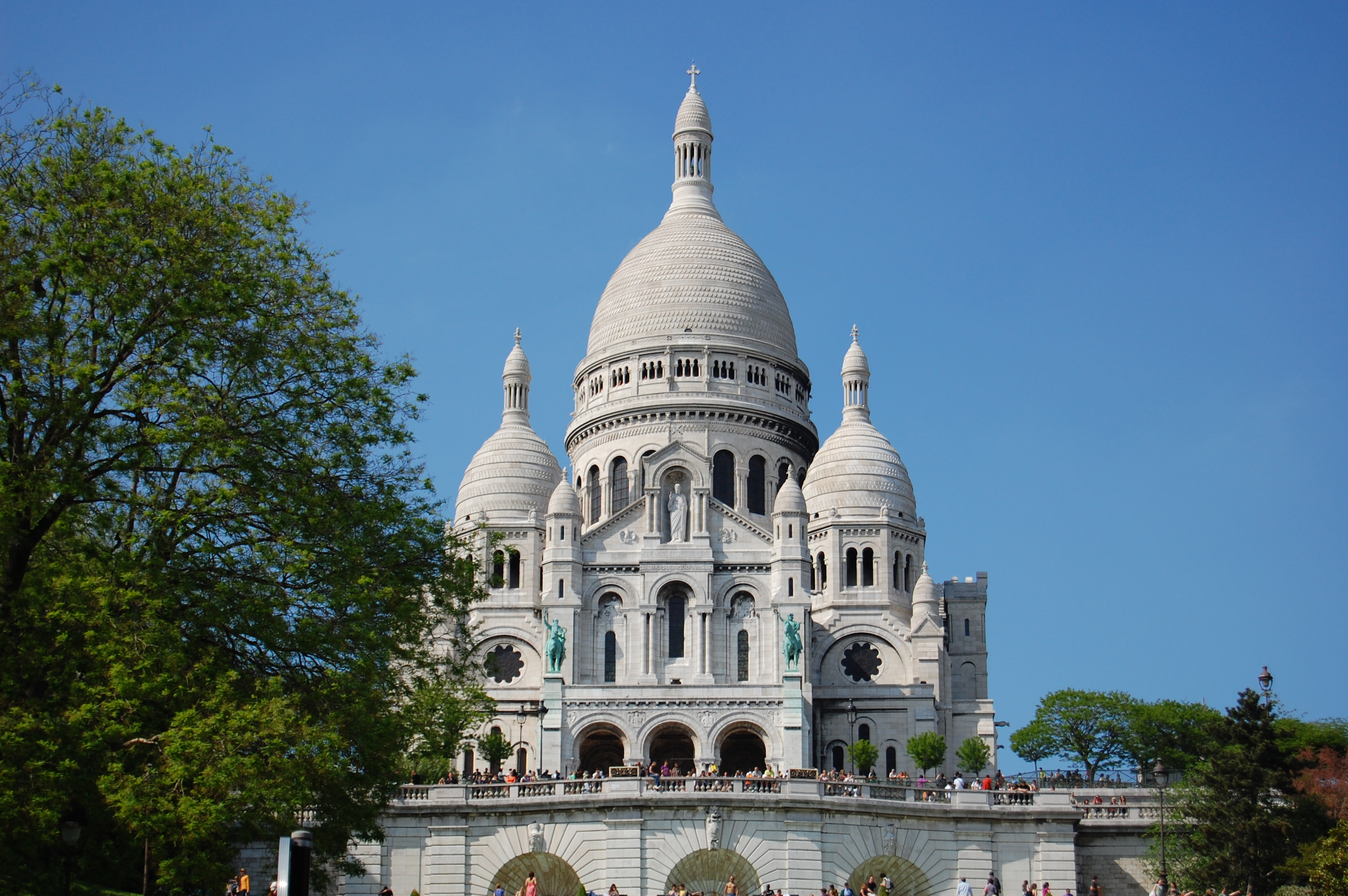 Basilique de Sacre Coeur in Montmartre